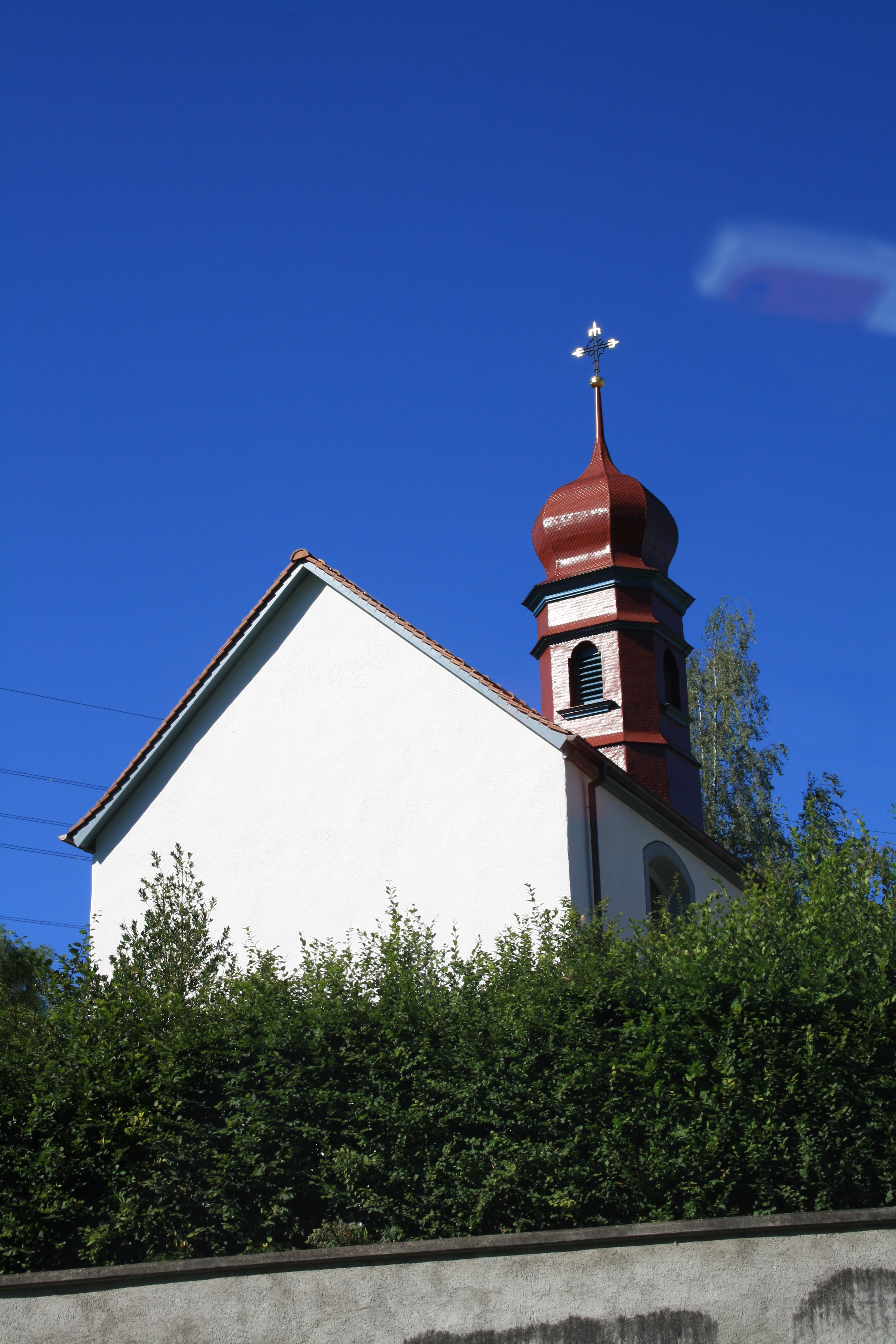 Kapelle von Böbikon, Aargau, Schweiz